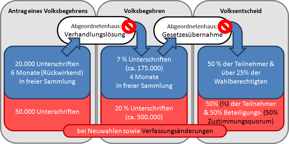 Grafik über das Volksgesetzgebungsverfahren im Land Berlin